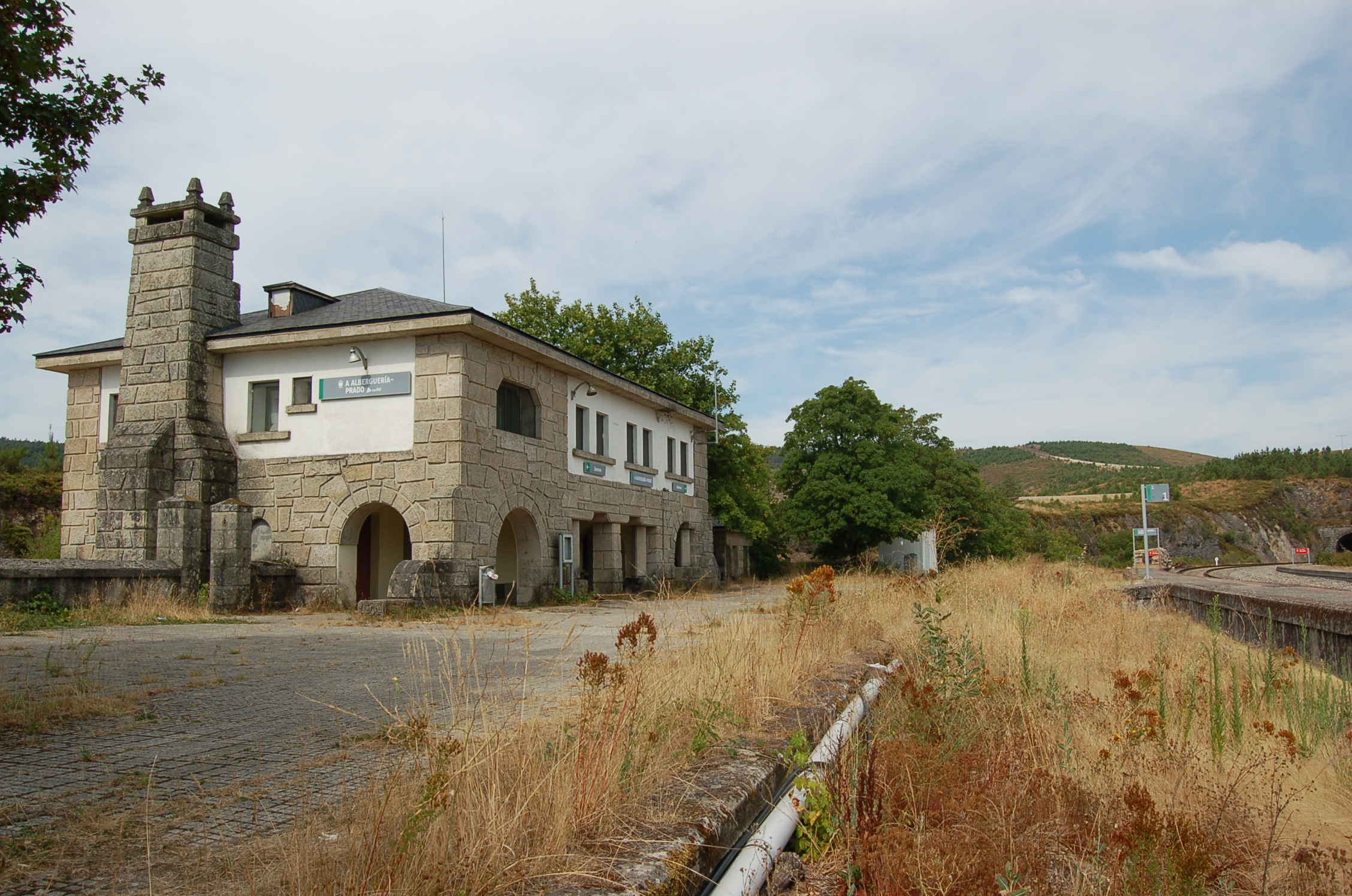 Estación de ferrocarril da Alberguería - Prado